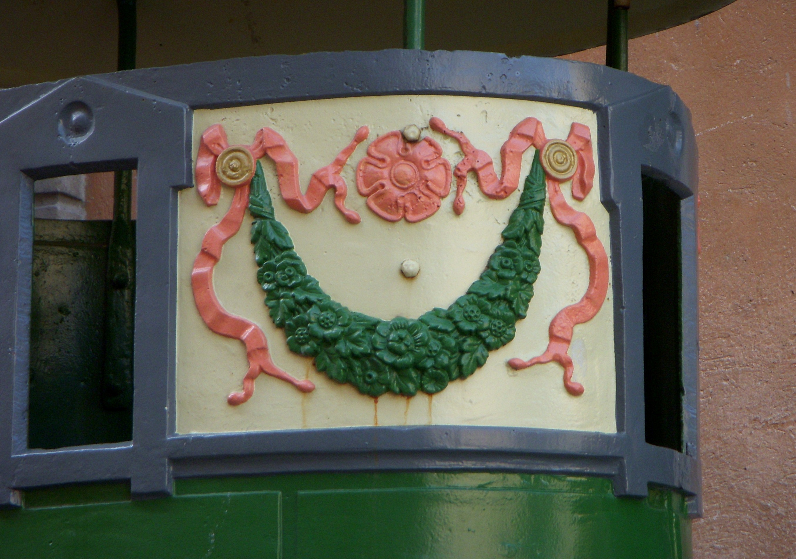 Urinoar från 1890-talet vid Källgränd i Gamla stan, detalj